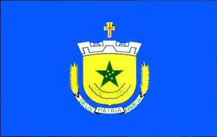 bandeira iguatemi ms